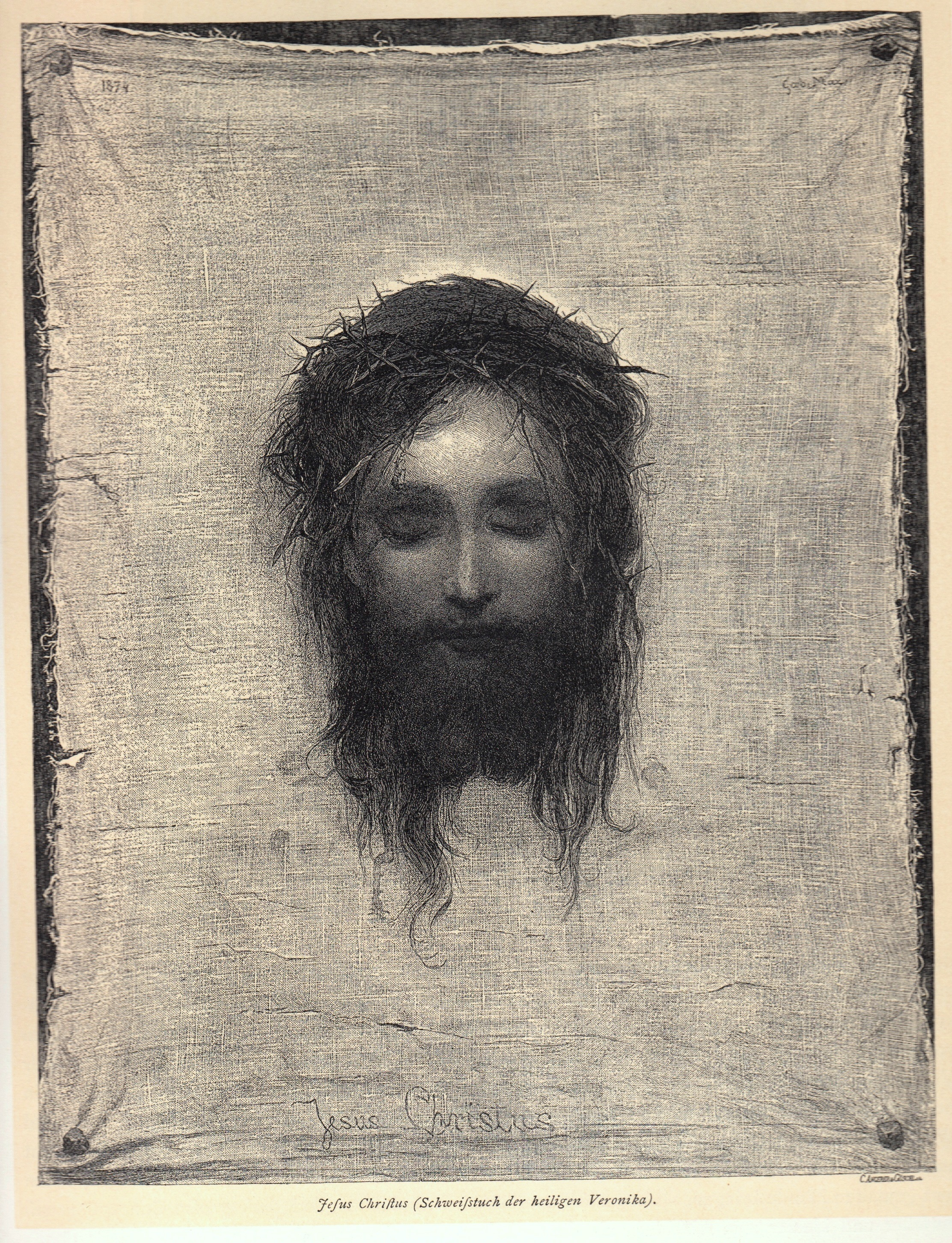 Reproduktion eines Gemäldes von Gabriel Max als Radierung, ausgeführt von Wilhelm Woernle 1885